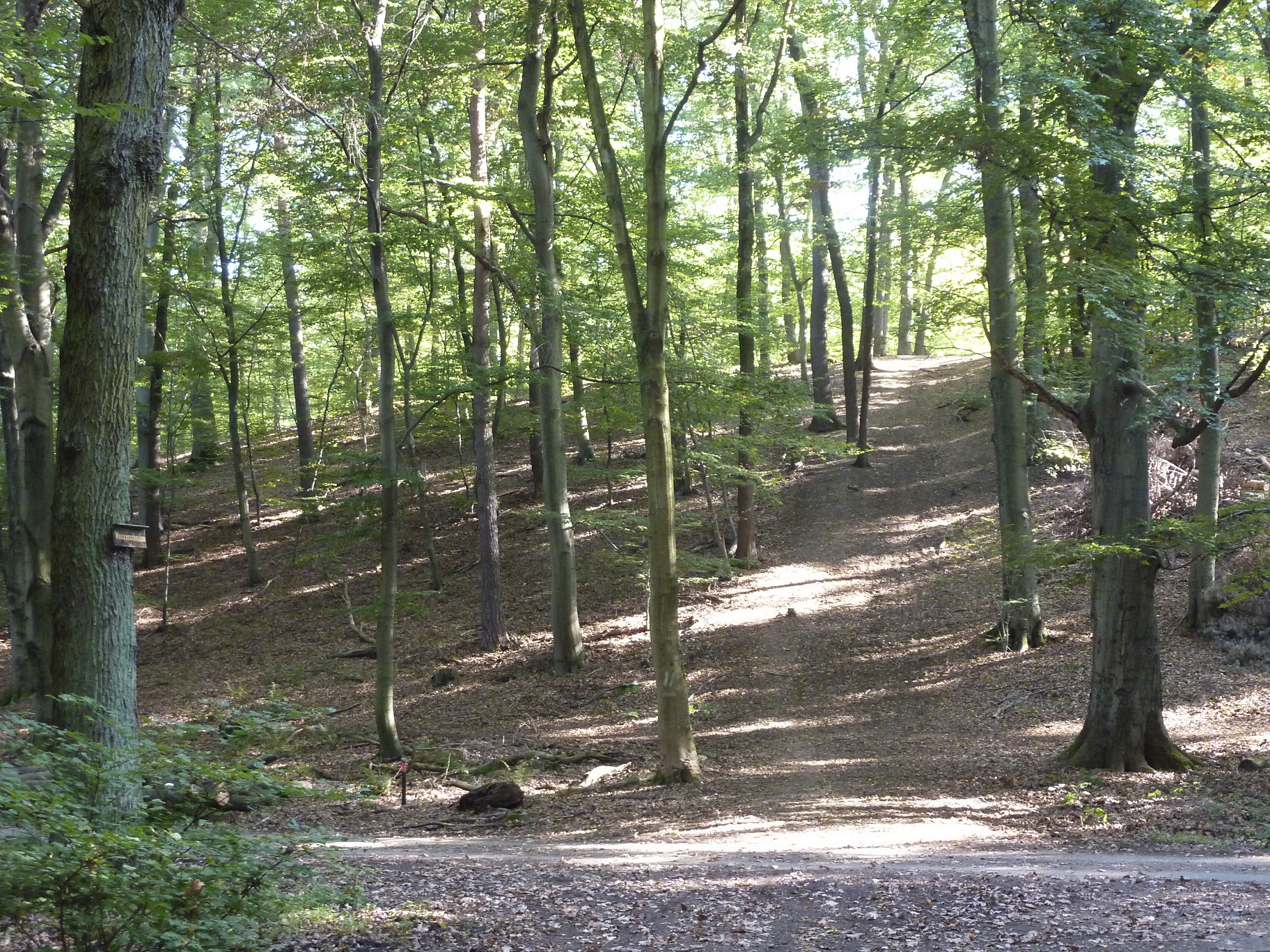 Frankfurt am Main, Bundesland Hessen: Die Kelsterbacher Terrasse ist eine acht Kilometer lange und bis zu 17 m hohe Geländestufe im Frankfurter Stadtwald. Die in west-östlicher Richtung verlaufende und nach Norden hin mäßig steil abfallende Terrasse ist eine Abbruchkante des Main-Urstromtals aus dem Erdzeitalter Pliozän. Sie beginnt im Westen am Mainufer in der Stadt Kelsterbach, durchläuft den Schwanheimer Wald und endet südlich des Frankfurter Stadtteils Niederrad. Das Foto zeigt einen Abschnitt der Terrasse im Schwanheimer Wald, Ansicht von Norden